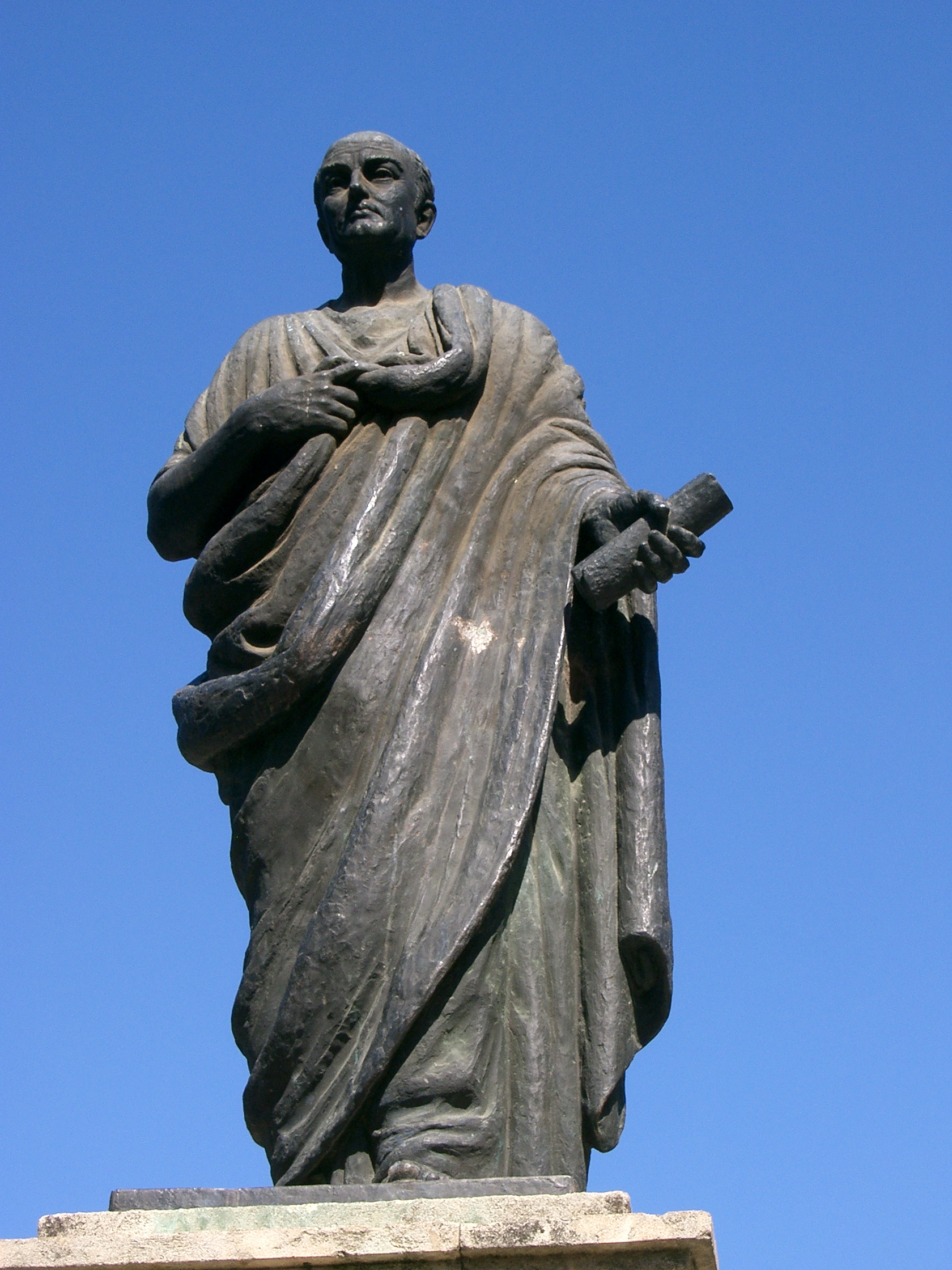 Estatua de Séneca en Córdoba, bronce de Amadeo Ruiz Olmos, 1965